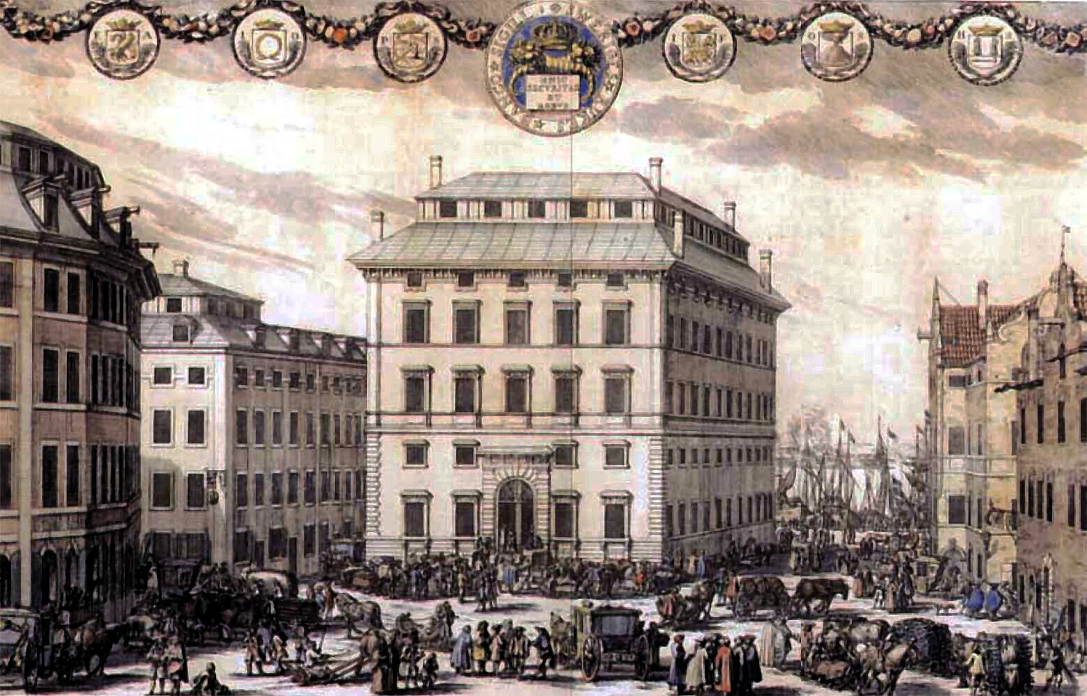 From this PDF, original from Suecia Antiqua et Hodierna, mid 17th century.Södra Bancohuset, Gamla stan, Stockholm. På kopparsticket av Willem Swidde år 1691, ur Erik Dahlberghs "Suecia antiqua et hodierna", dominerar Tessins ståtliga bankohus i fonden. På huset till höger syns Blå Örnens krogskylt, enligt Stockholms stadsmuseum.